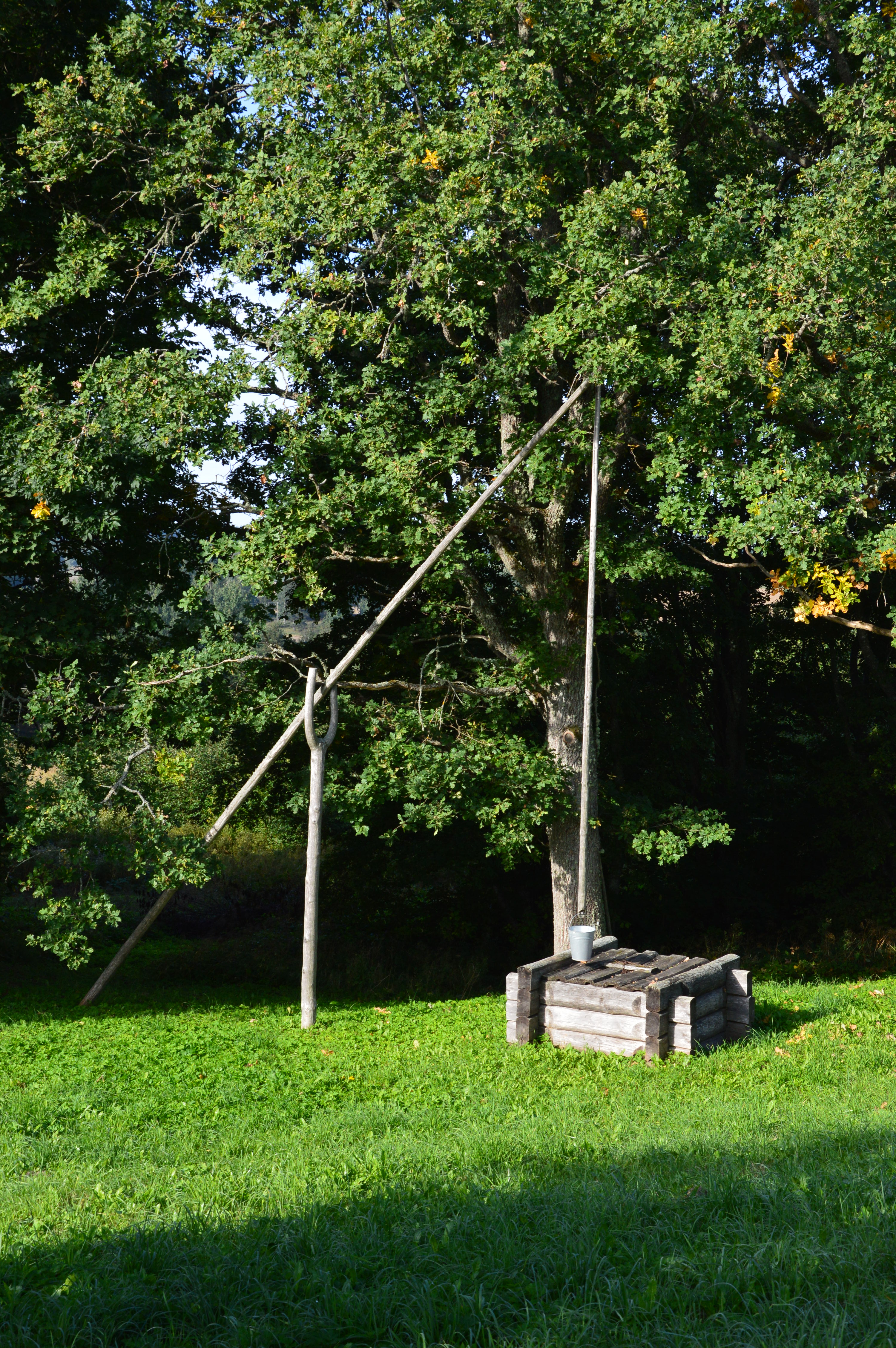 Hinni talu kaev